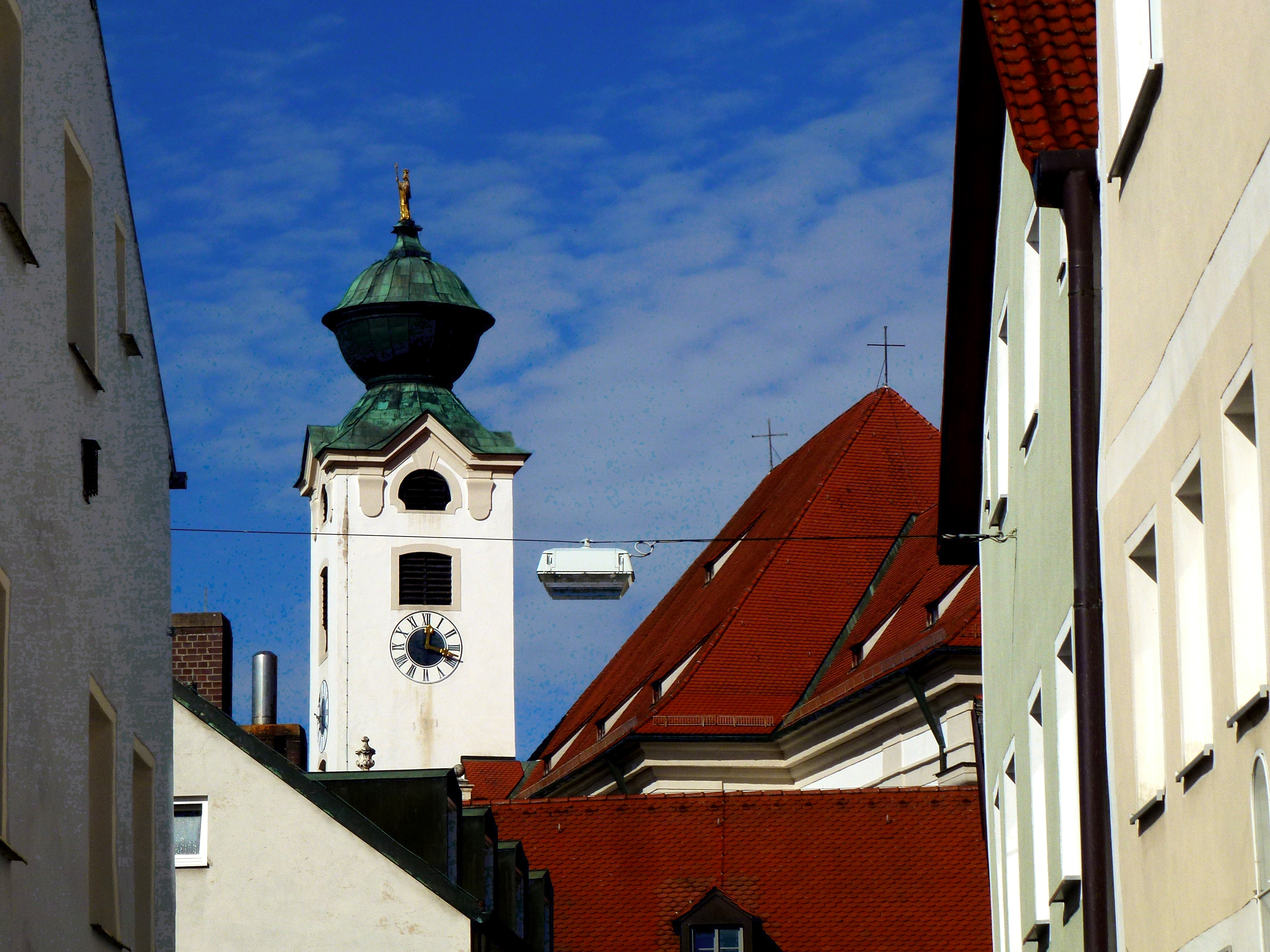 Turm der Kirche St.Walburg in Eichstätt